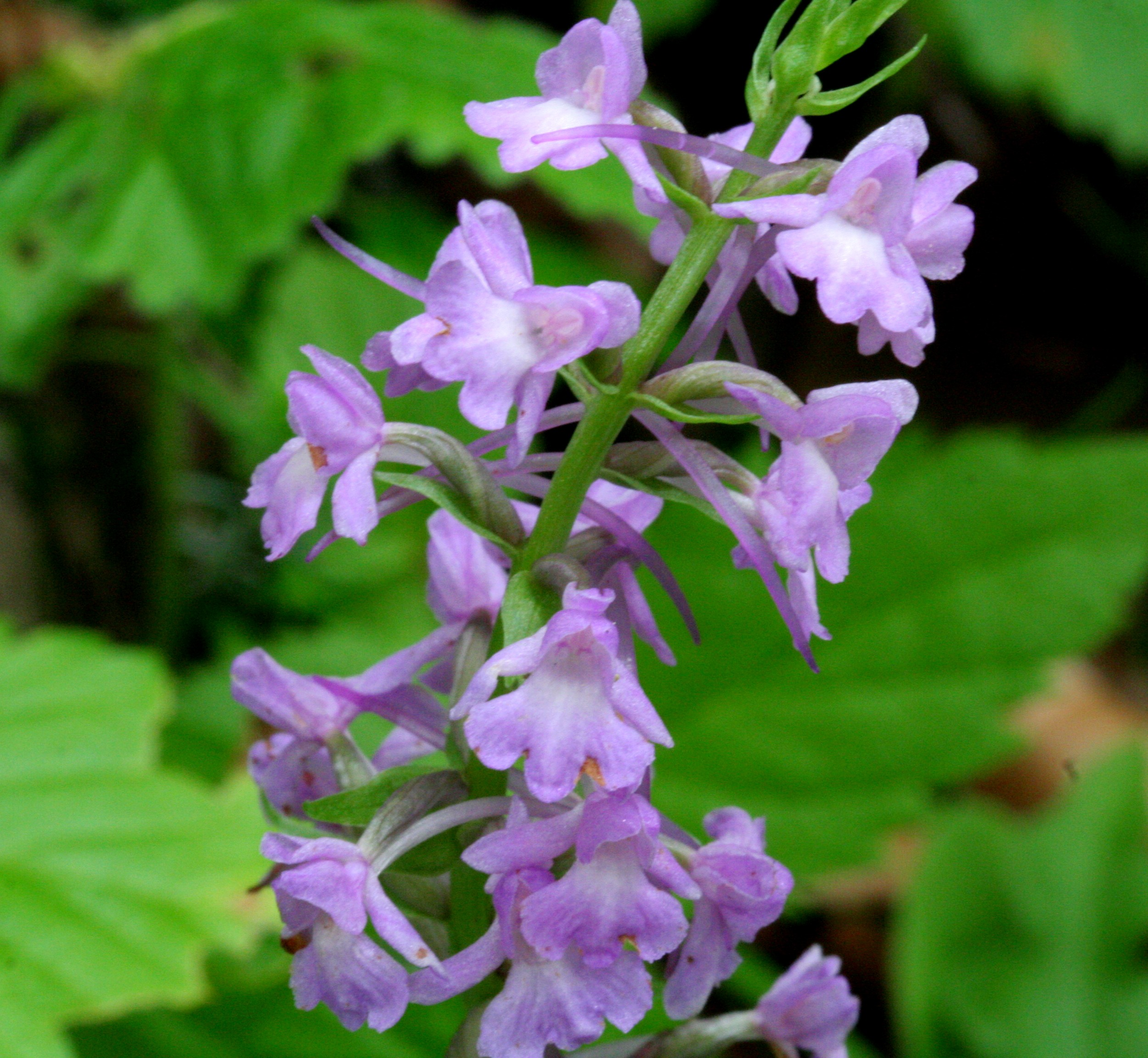 Manina rosea - Località: Cortina (BL), 1400 m s.l.m.